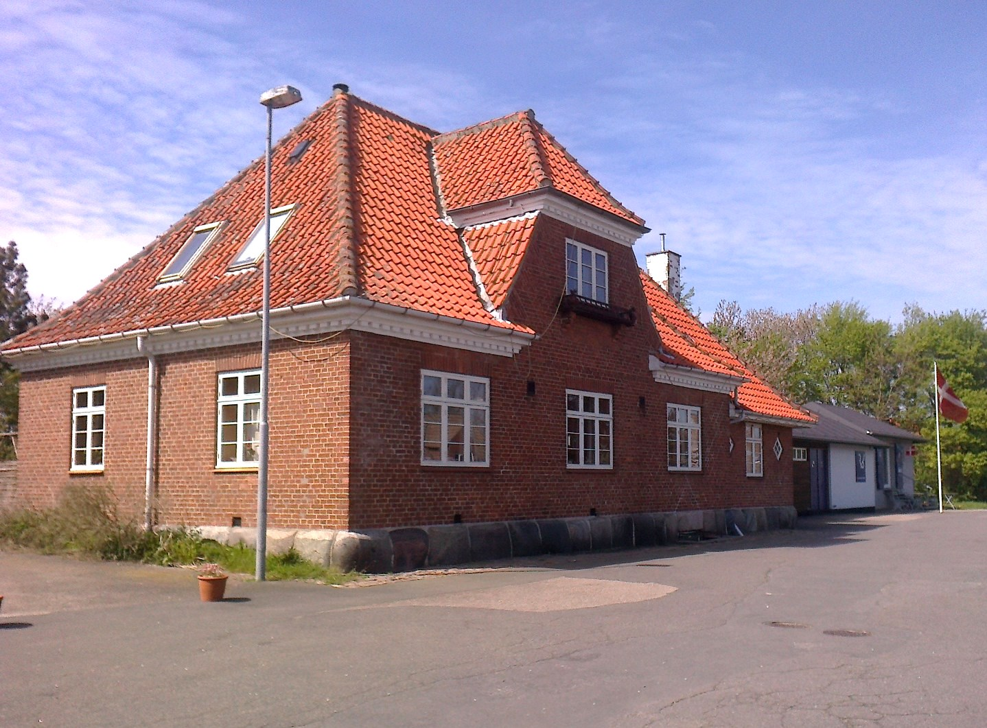 Rø Station